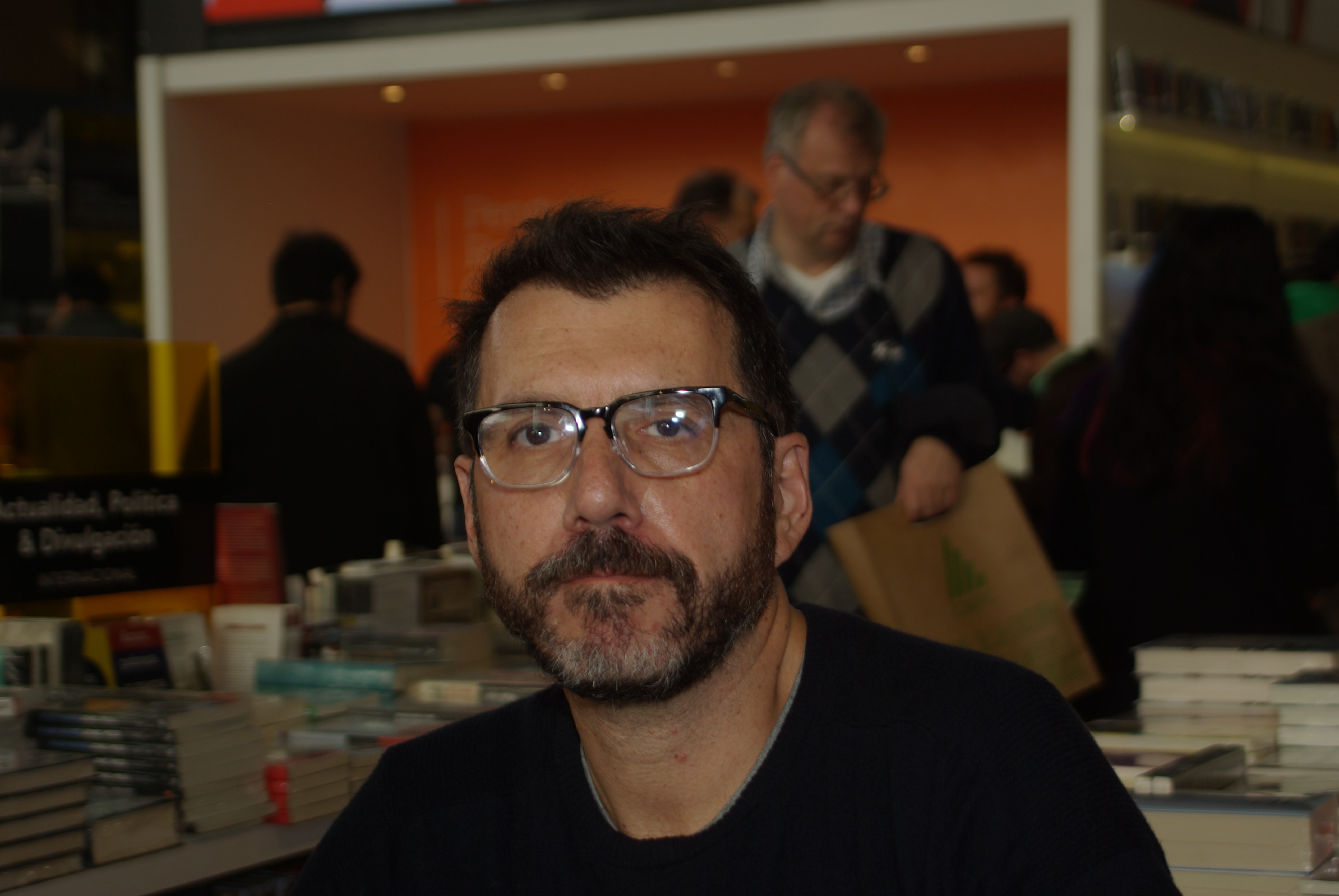 El escritor y cineasta chileno Alberto Fuguet en la Feria Internacional del Libro de Santiago 2015